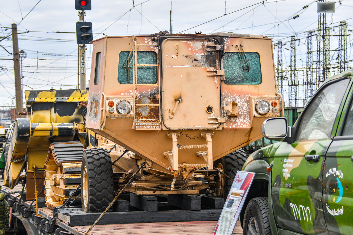 Сирийский перелом во Владимире